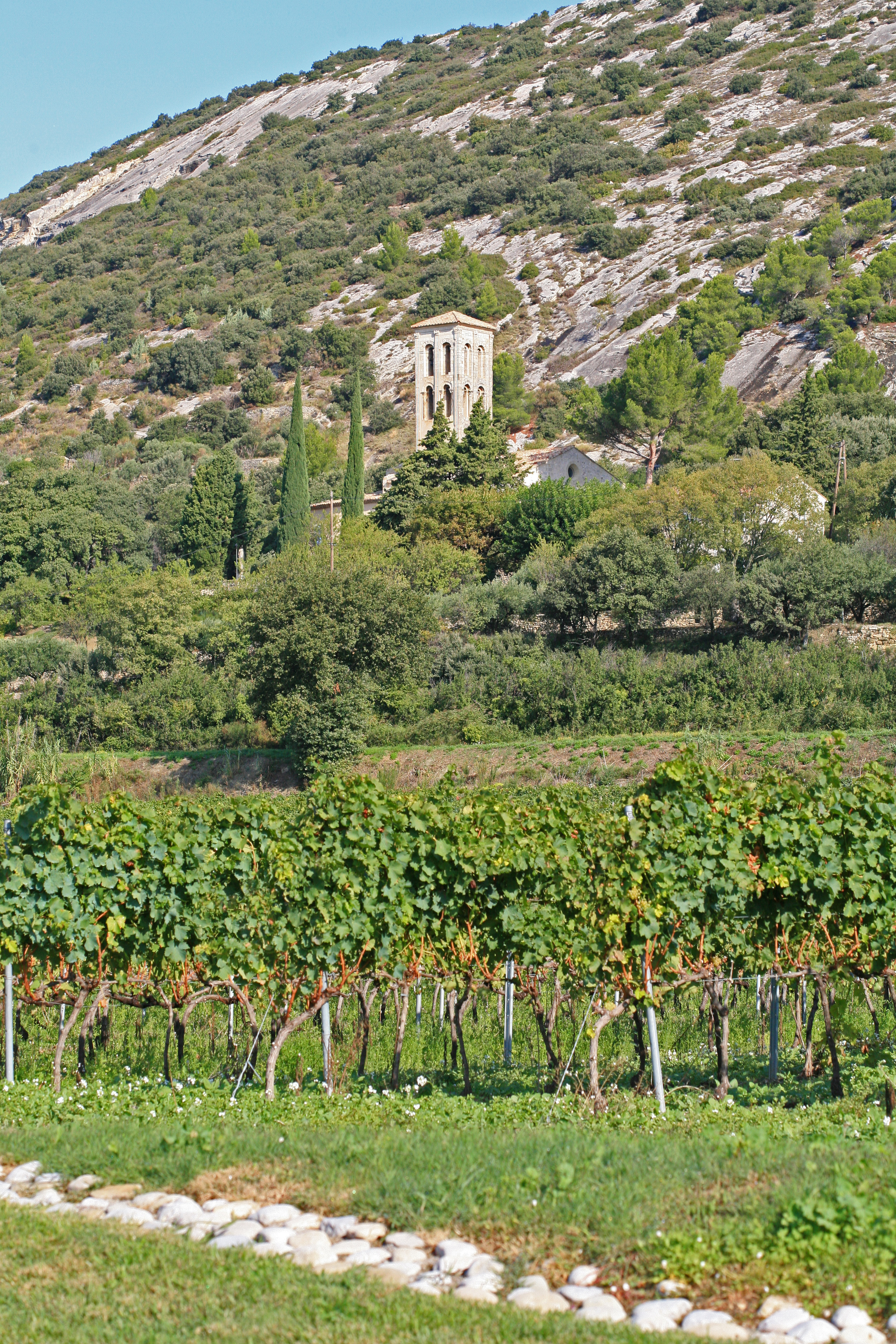 beaumes de venise, Vaucluse, France